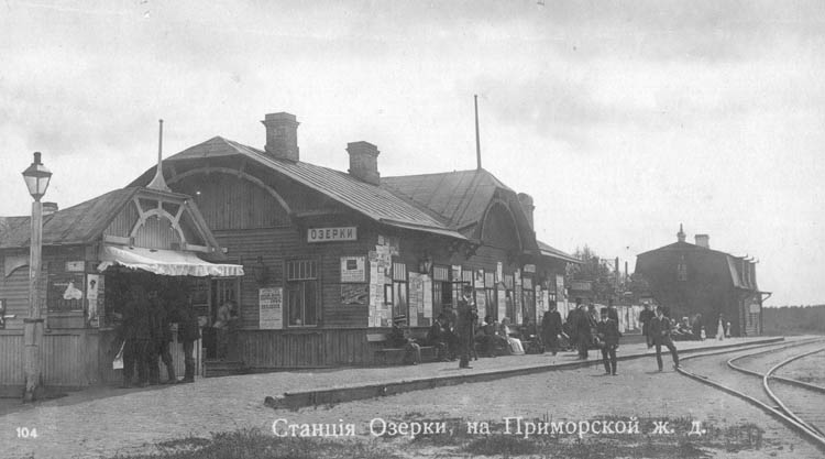 Станция Озерки приморской железной дороги